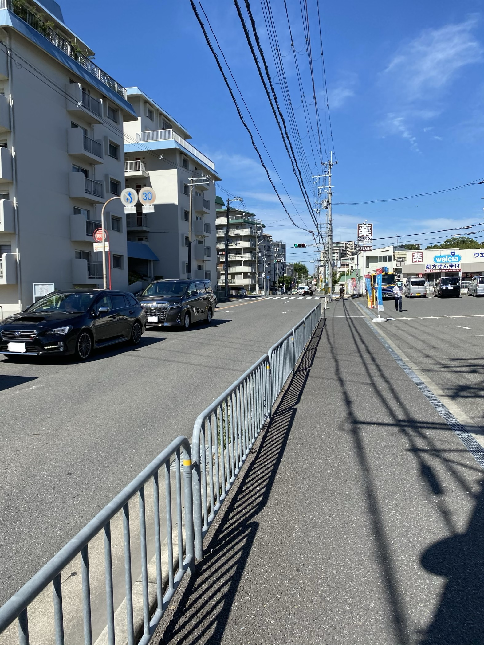 古曽部町2丁目の京都府道・大阪府道67号西京高槻線にて。1970年代から80年代にかけて建てられた集合住宅が立ち並ぶ。